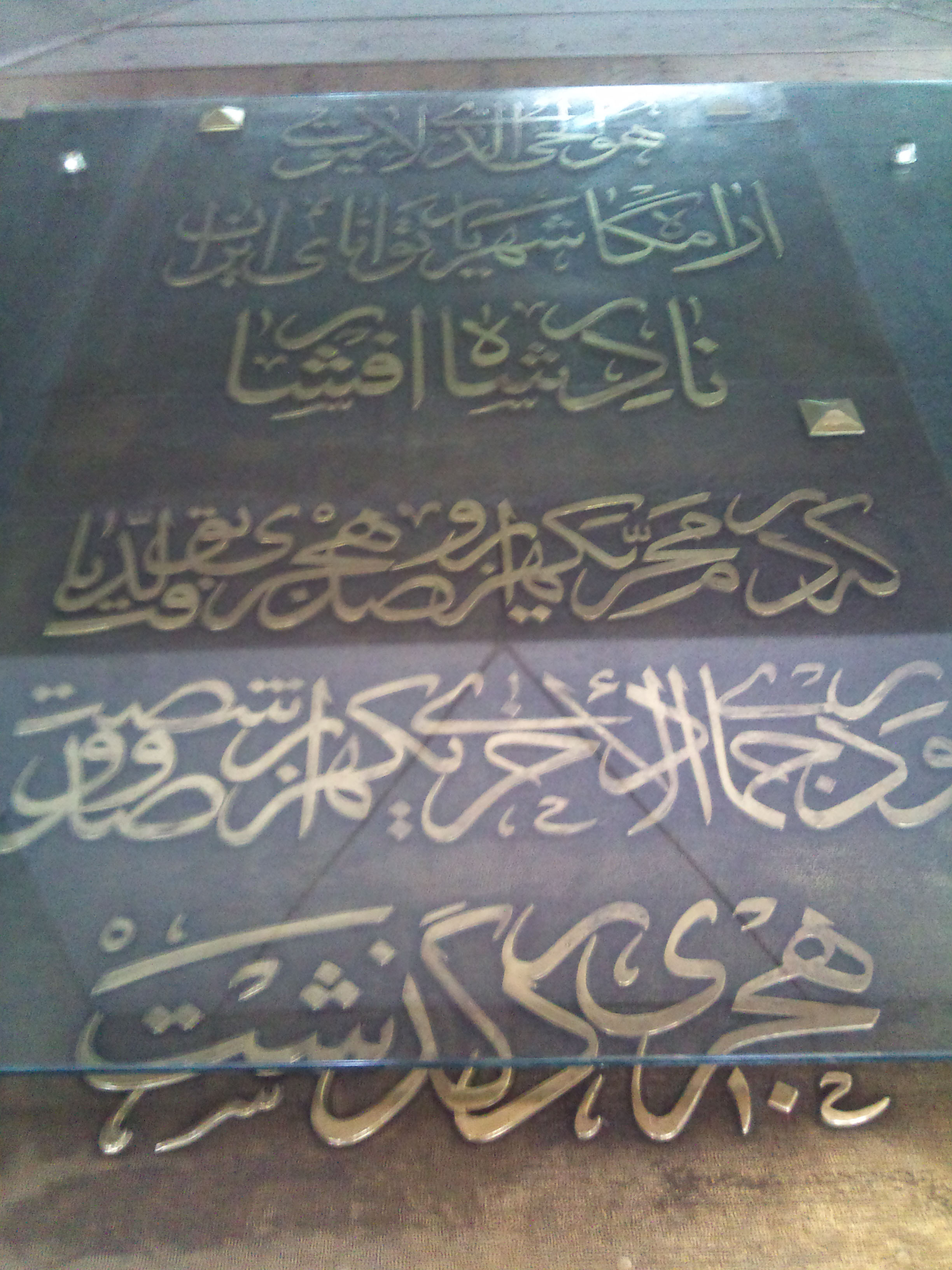 Mashhad museum